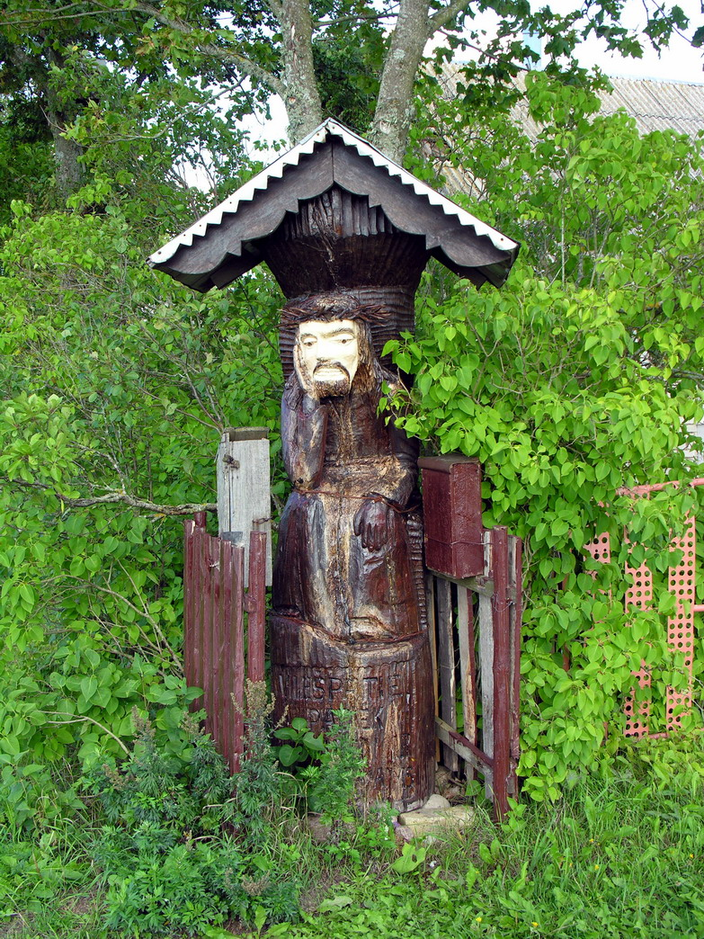 Skuodiškiai, Mažeikių rajonas, Šerkšnėnų seniūnija Rūpintojėlio skulptūra prie sodybos vartų Foto: Algirdas, 2006 m. rugsėjo 2 d., Lietuva